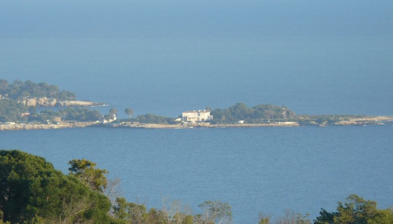 Pointe de l'ilette, vue de la tour de la Castre à Cannes